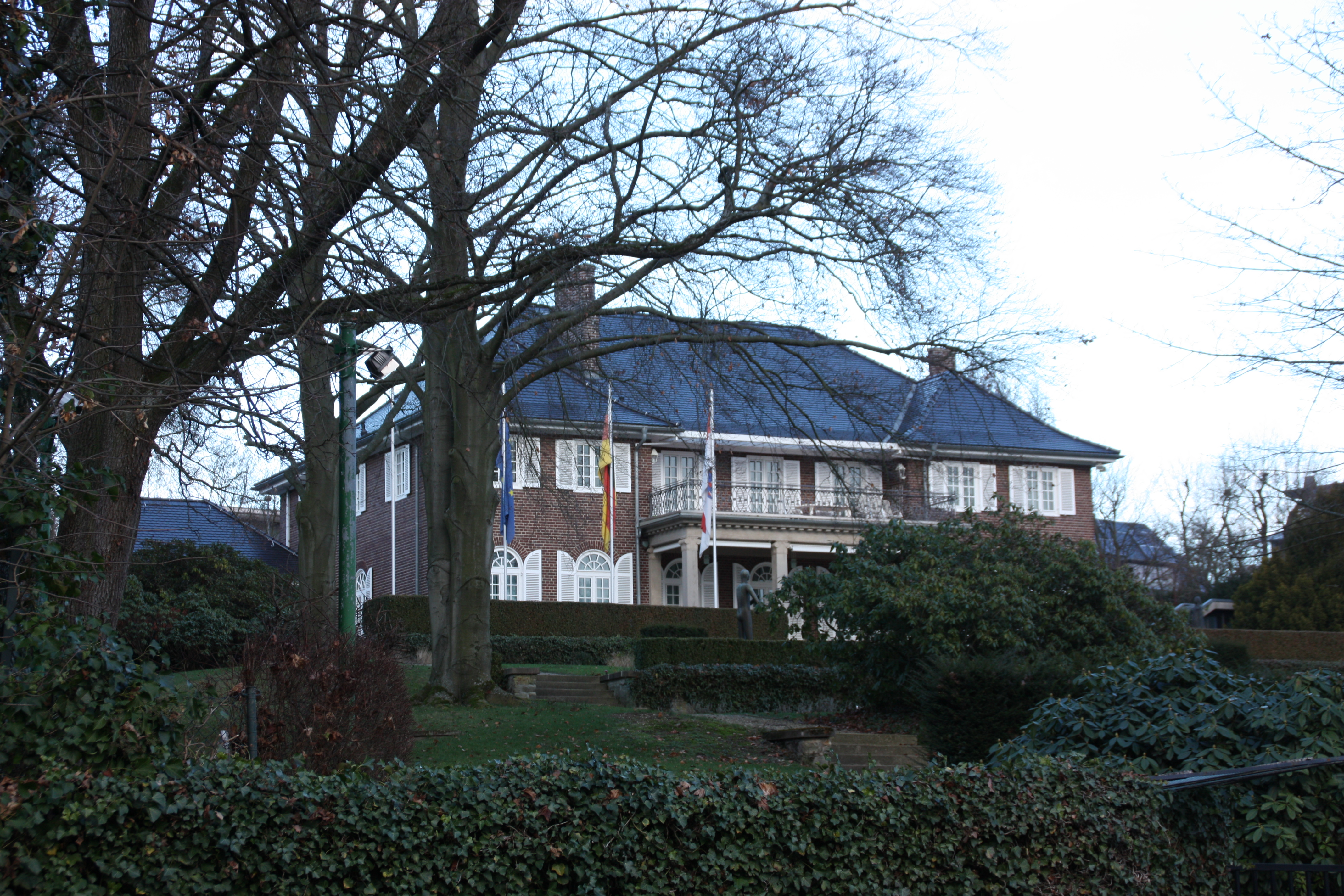 "Villa von Schertel" in Wiesbaden, Hessen, Deutschland